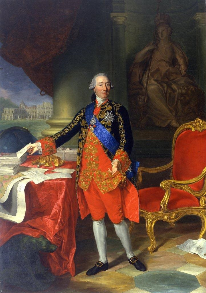 Retrato del primer duque de Grimaldi (1710-1789), Primer Ministro de España con Carlos III